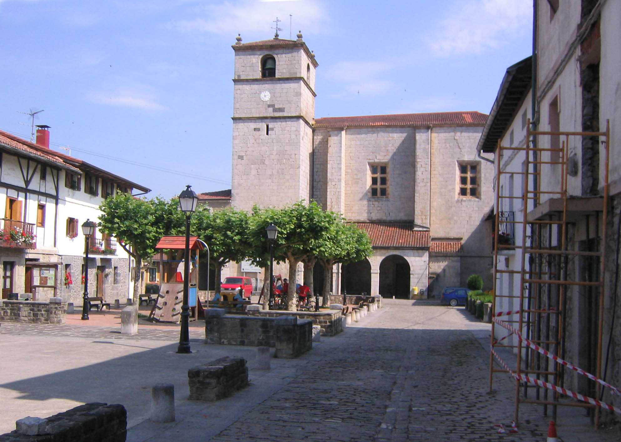 Plaza de Aizarna con la Iglesia de Nuestra Señora de la Asunción. Iglesia de Aizarna Cestona, Guipúzcoa, País Vaco, España.